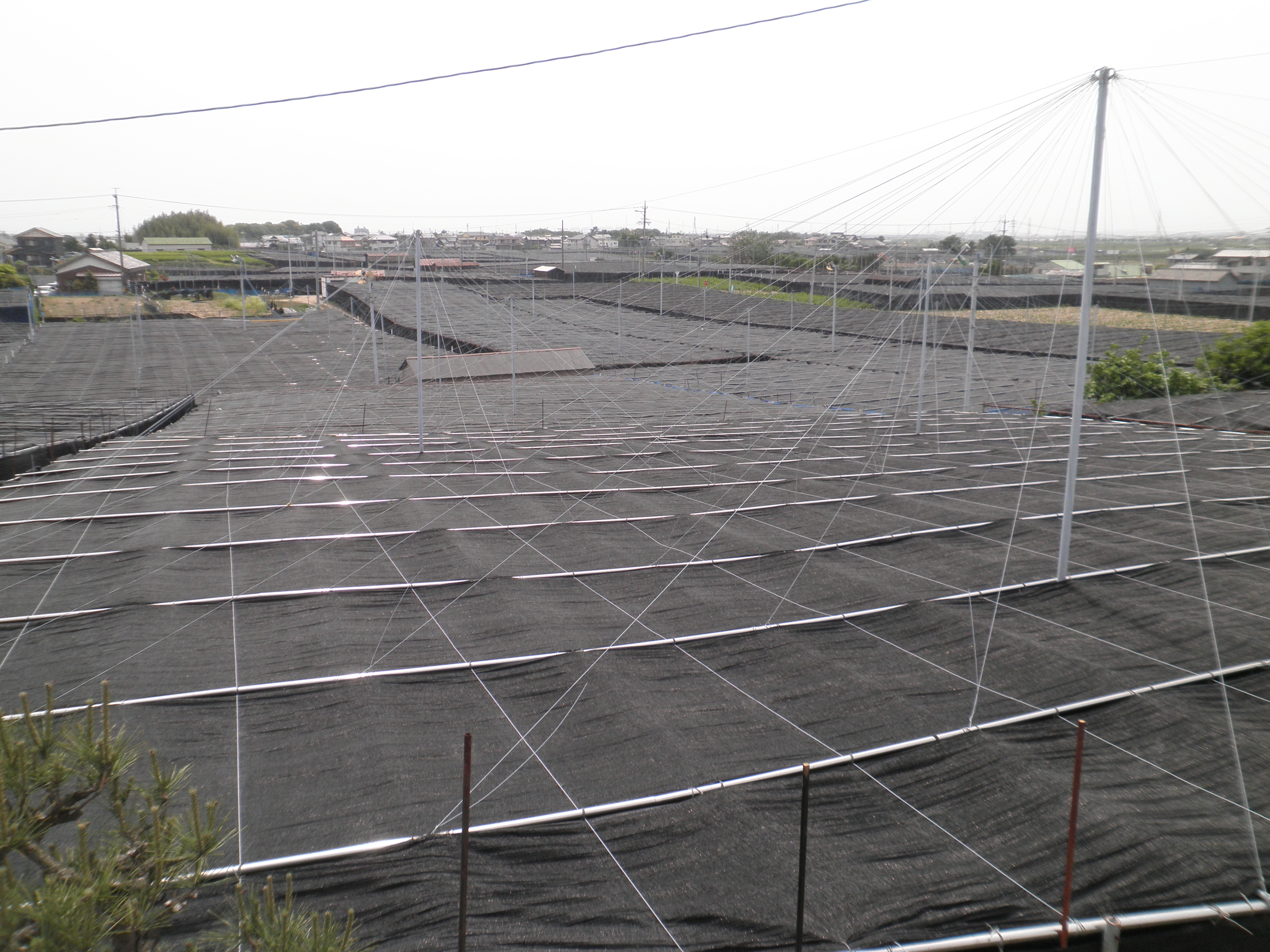 愛知県西尾市の茶園。碾茶を生産するために黒いネットで被覆している。